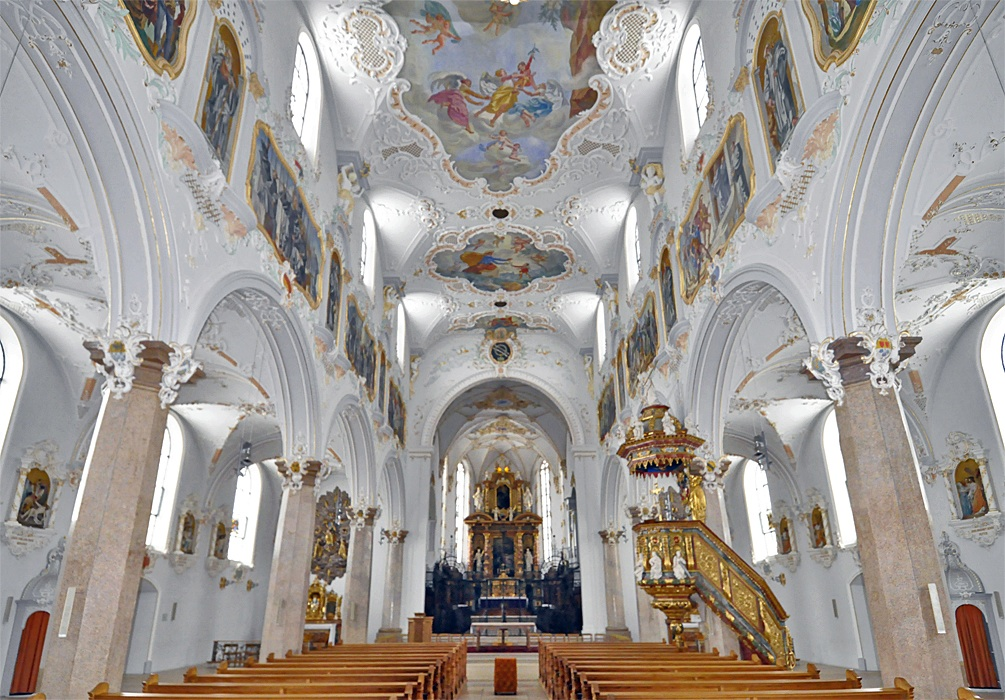 Inneres der Klosterkirche Mariastein